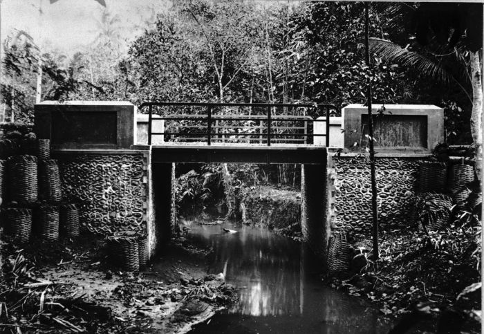 Foto. Brug met betongewelfjes over de Oerang-rivier in de weg van Soekaradja - Wetan naar Petir-Kidoel; brug is door de suikerfabariek gebouwd; de wijdte tussen de landhoofden is 4.40 meter en de breedte tussen de leuningen is 5 meter, Midden-Java